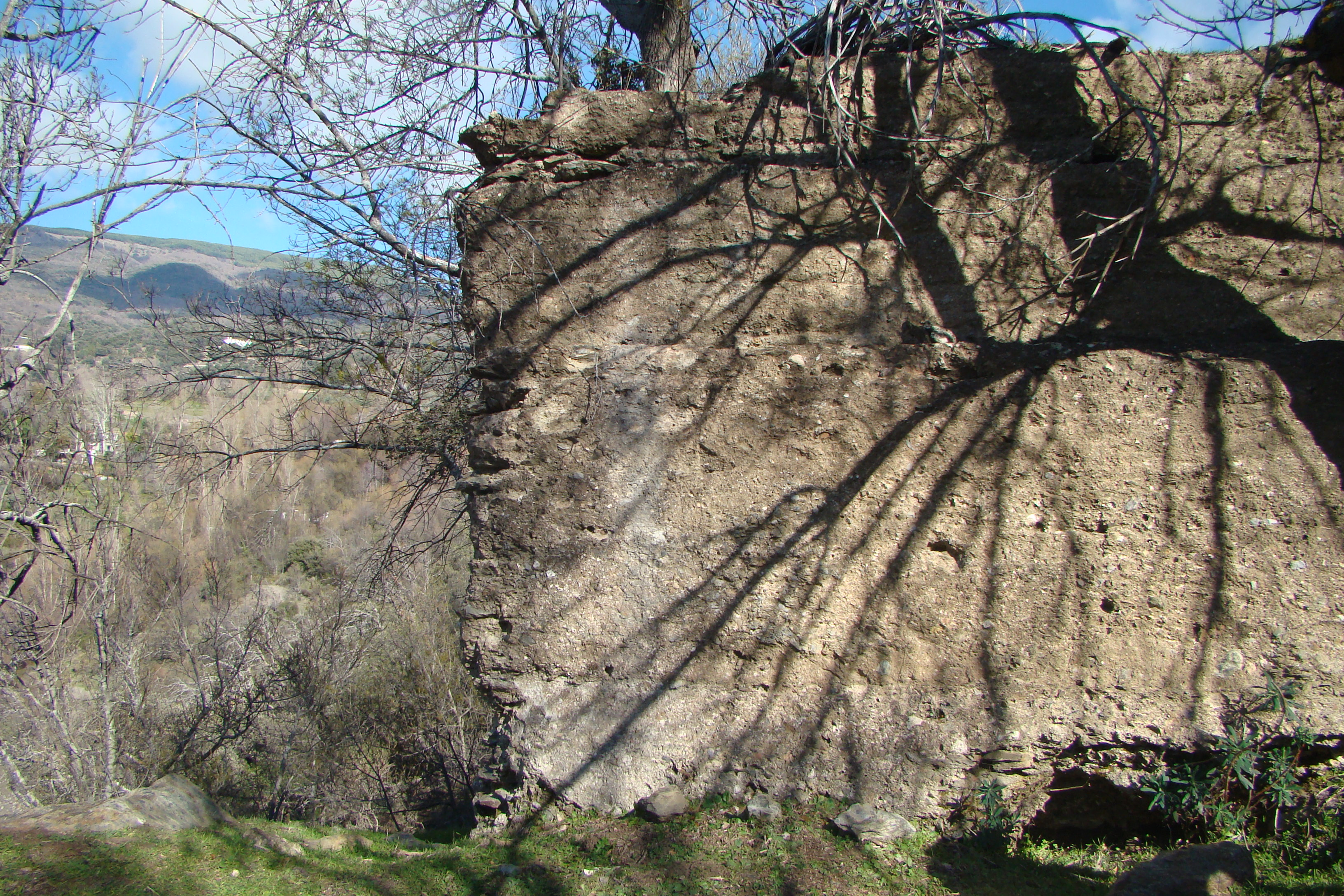 Paño de muro en la Mezquita de Busquístar (Granada, España)